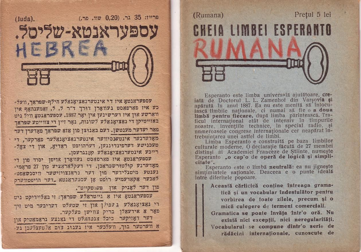 Rumana kaj hebra ŝlosiloj